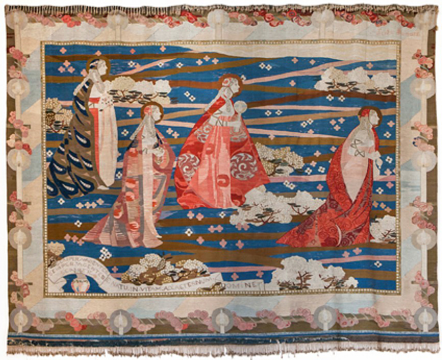 Semper Vadentes